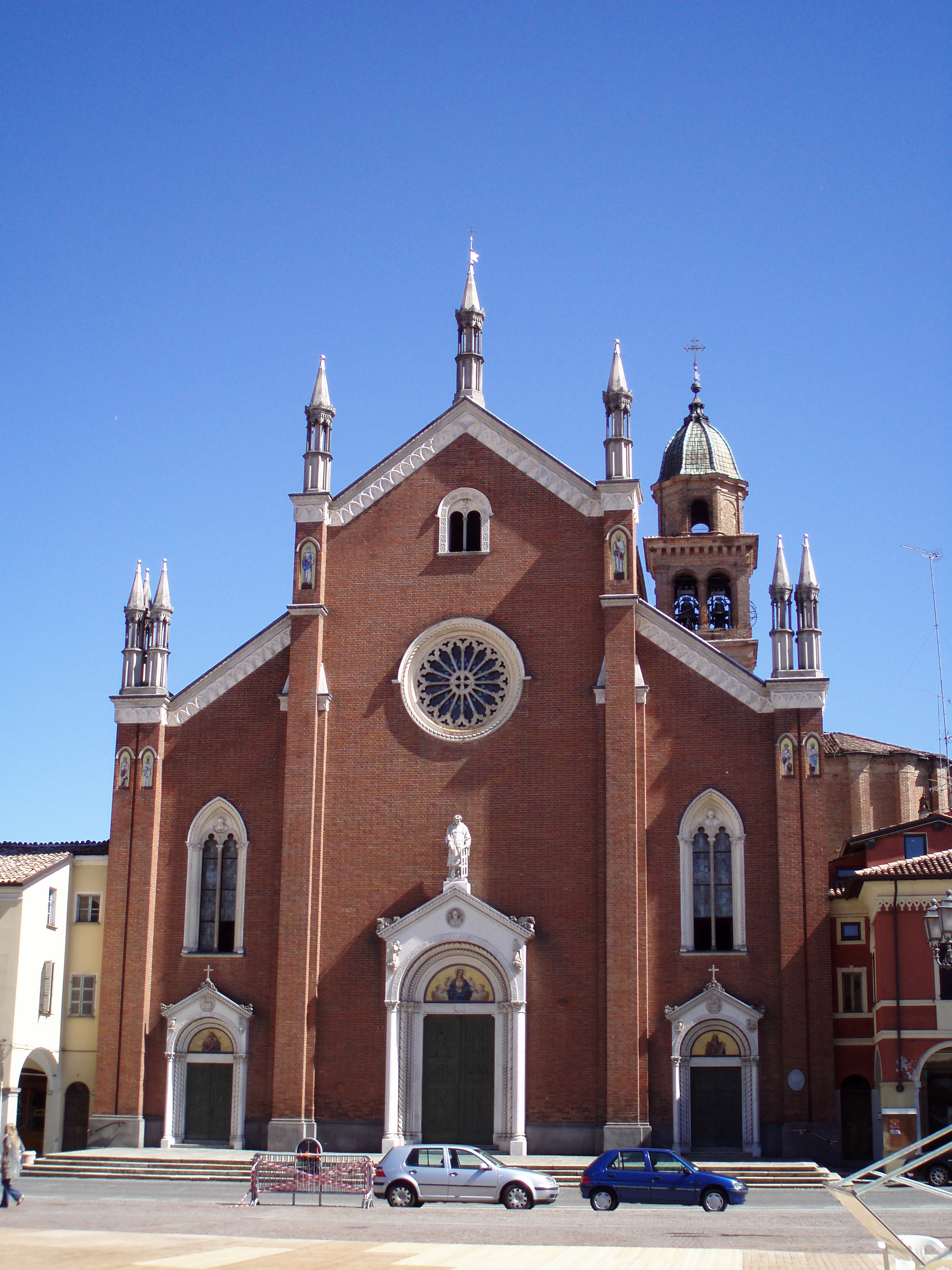 Chiesa Collegiata di Cortemaggiore (provincia di Piacenza)